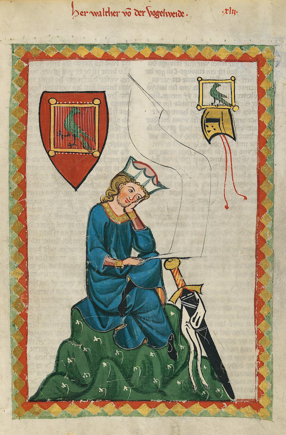 Codex Manesse, UB Heidelberg, Cod. Pal. germ. 848, fol. 124r, Herr Walther von der Vogelweide